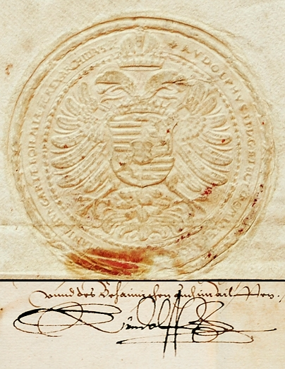 Kaiser Rudolf II (HRR): Unterschrift (1586) und Kaisersekret für Böhmen